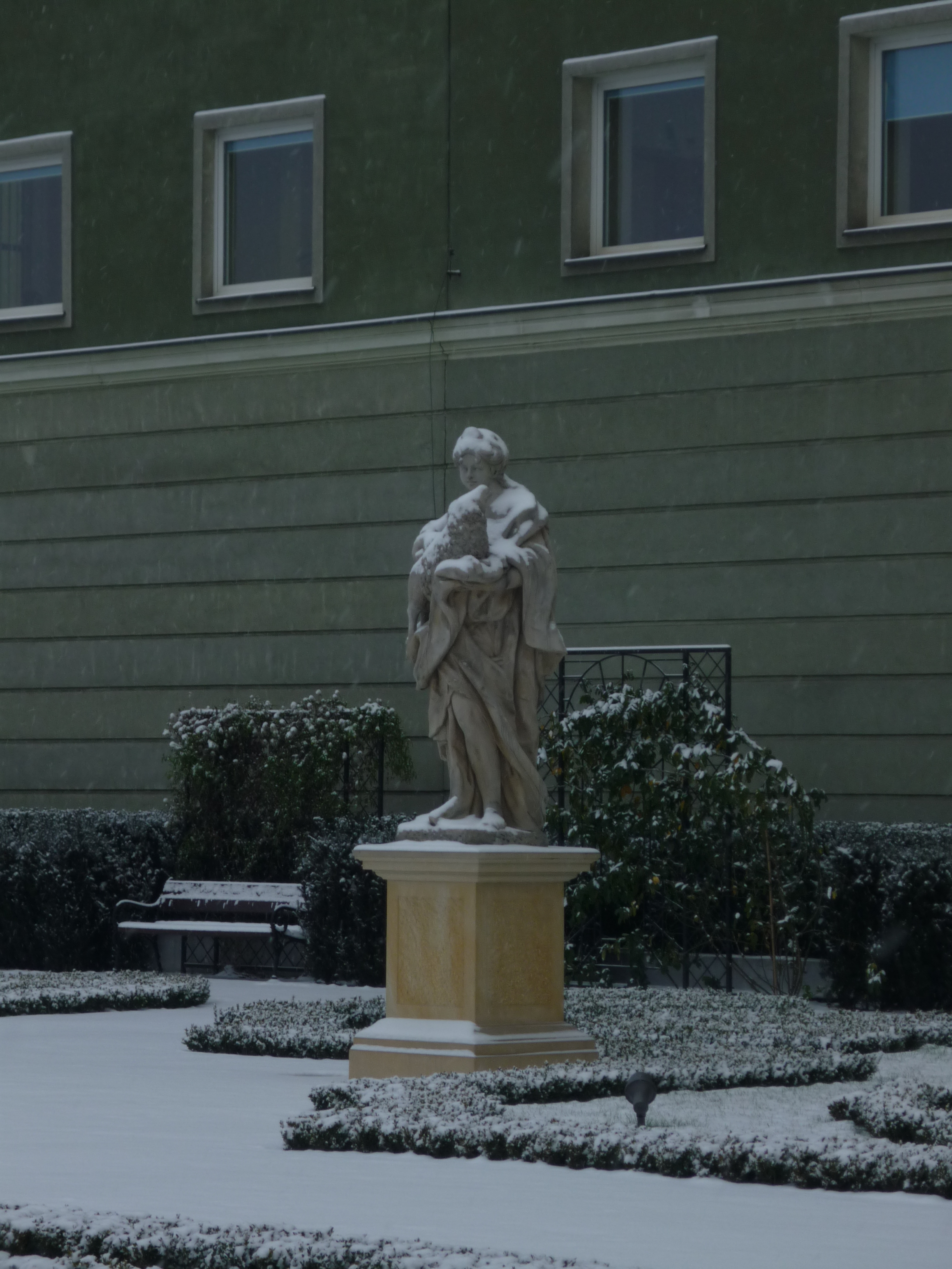 Ogród Barokowy przy Muzeum Miejskim Wrocławia